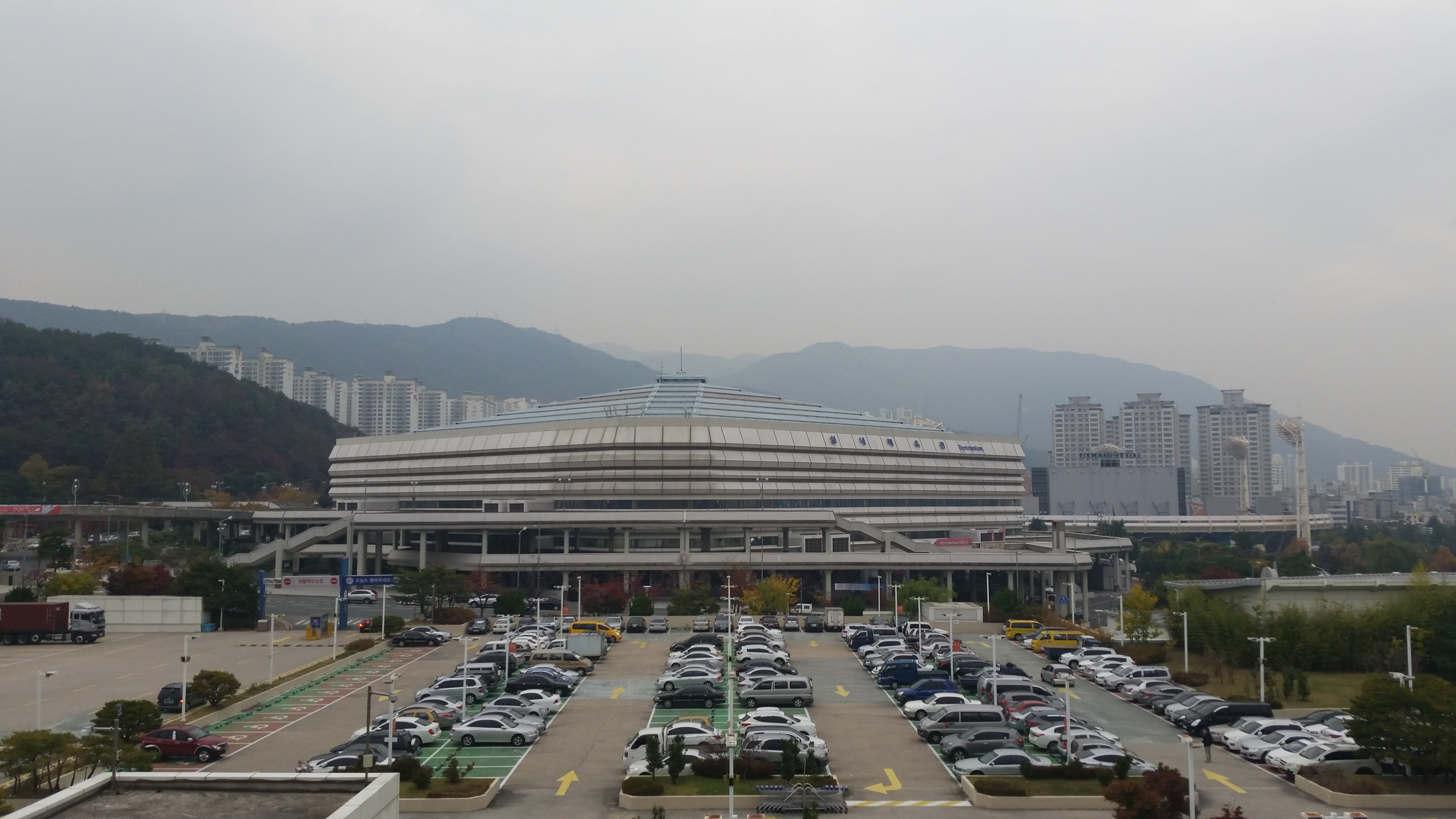 사직실내체육관